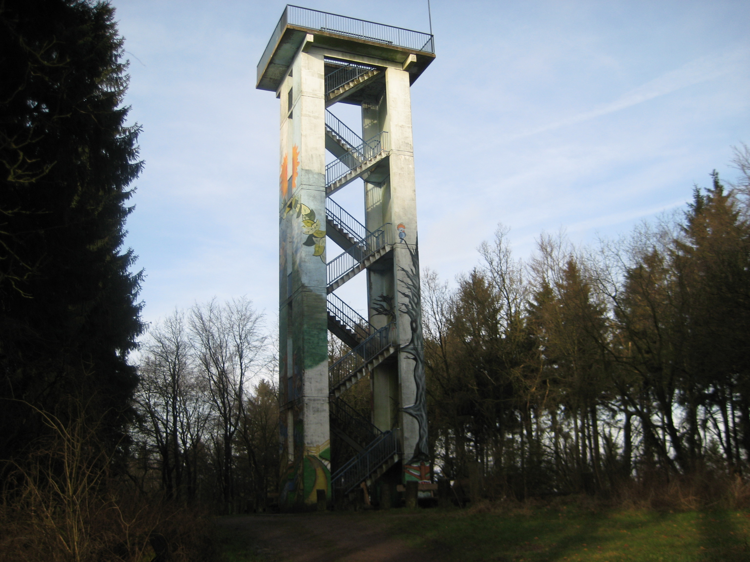 Hermannsturm (Georgsmarienhütte) auf dem Dörenberg in Niedersachsen, Deutschland